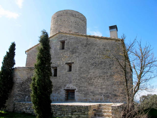 Castell de Mejanell a la Segarra - Catalunya